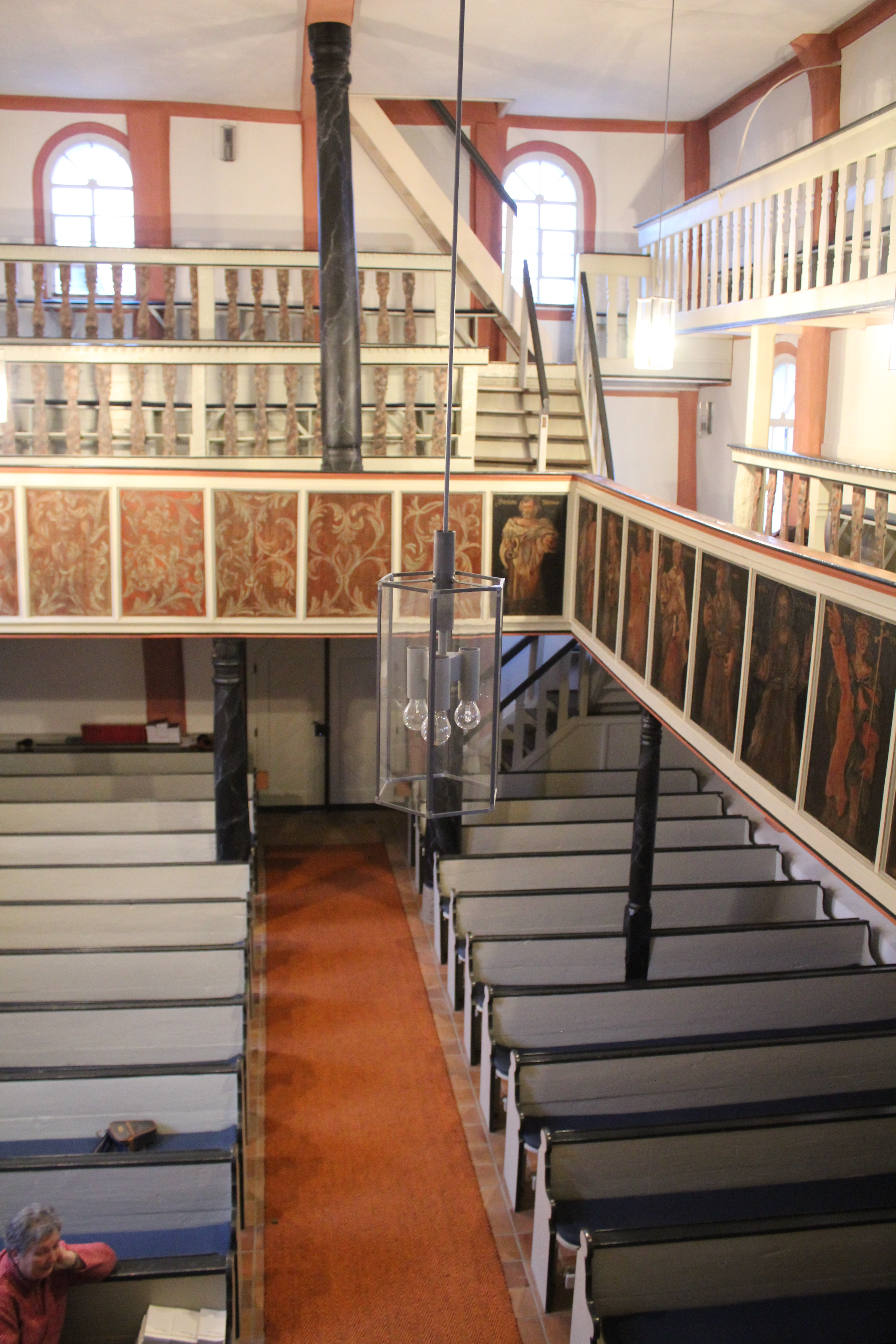 Evangelische Kirche Sellnrod, Gemeinde Mücke, Vogelsbergkreis, Hessen, Deutschland